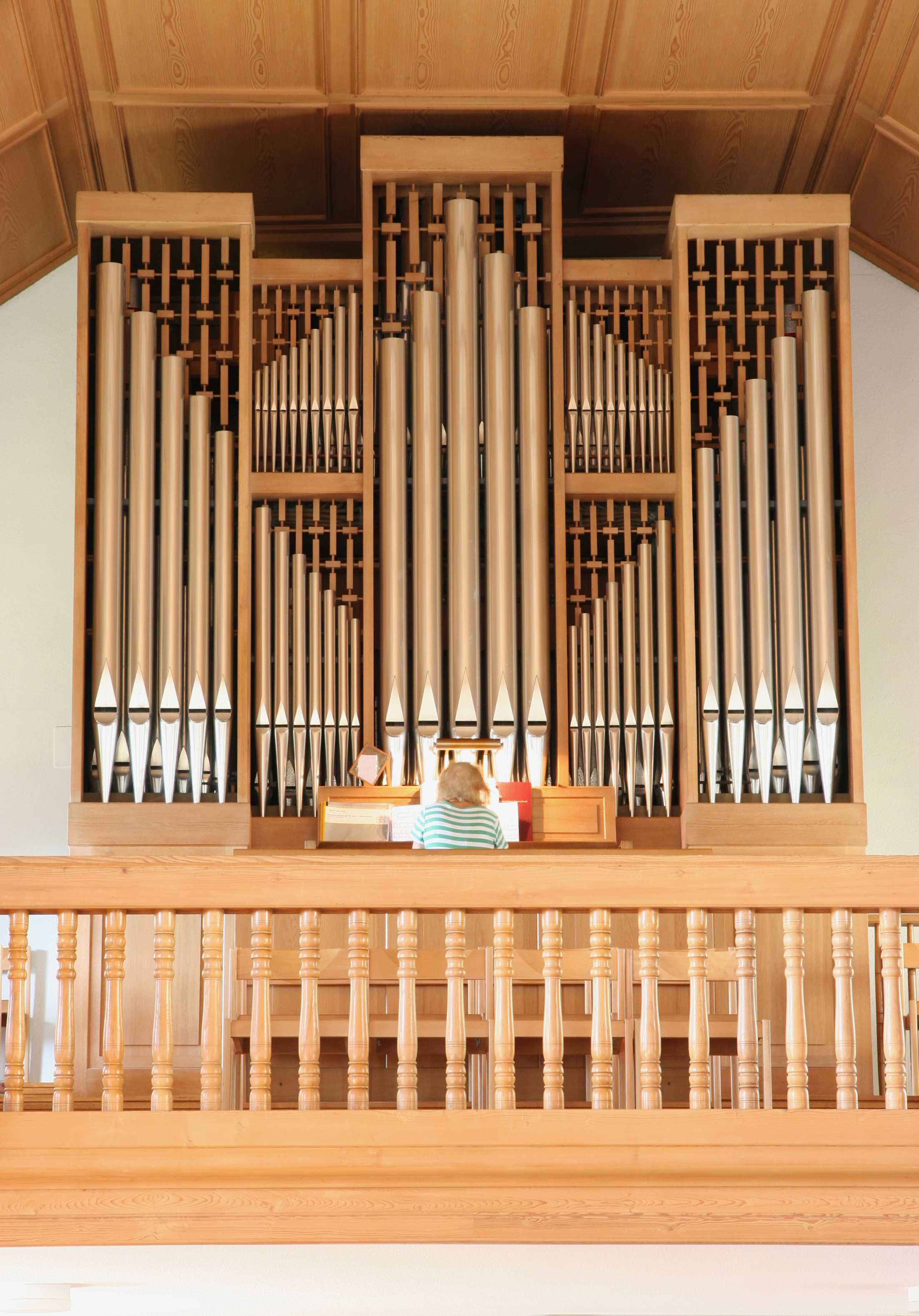 Evangelisch-reformierte Kirche Zürich-Höngg